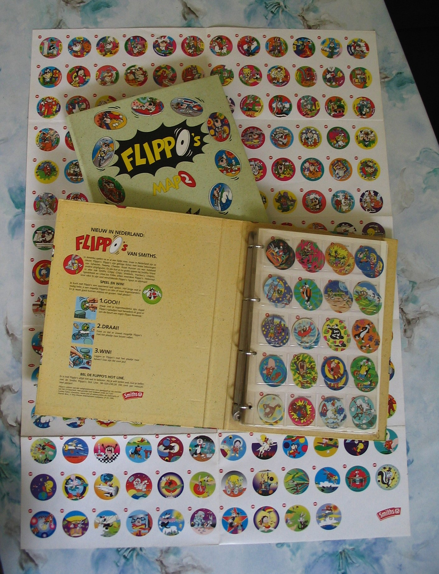 Mijn (onvolledige) verzameling flippo's, twee mappen, een poster en honderden verschillende flippo's. Deze afbeelding is bedoeld voor de flippo pagina. Deze foto is genomen op nl:10 augustus, nl:2005. Ik verklaar hierbij de auteur van de foto te zijn en plaats deze onder het GNU Free Documentation License. Auteur: Bruce van der Kooij Datum: nl:10 augustus, nl:2005 Camera: Canon Powershot A75